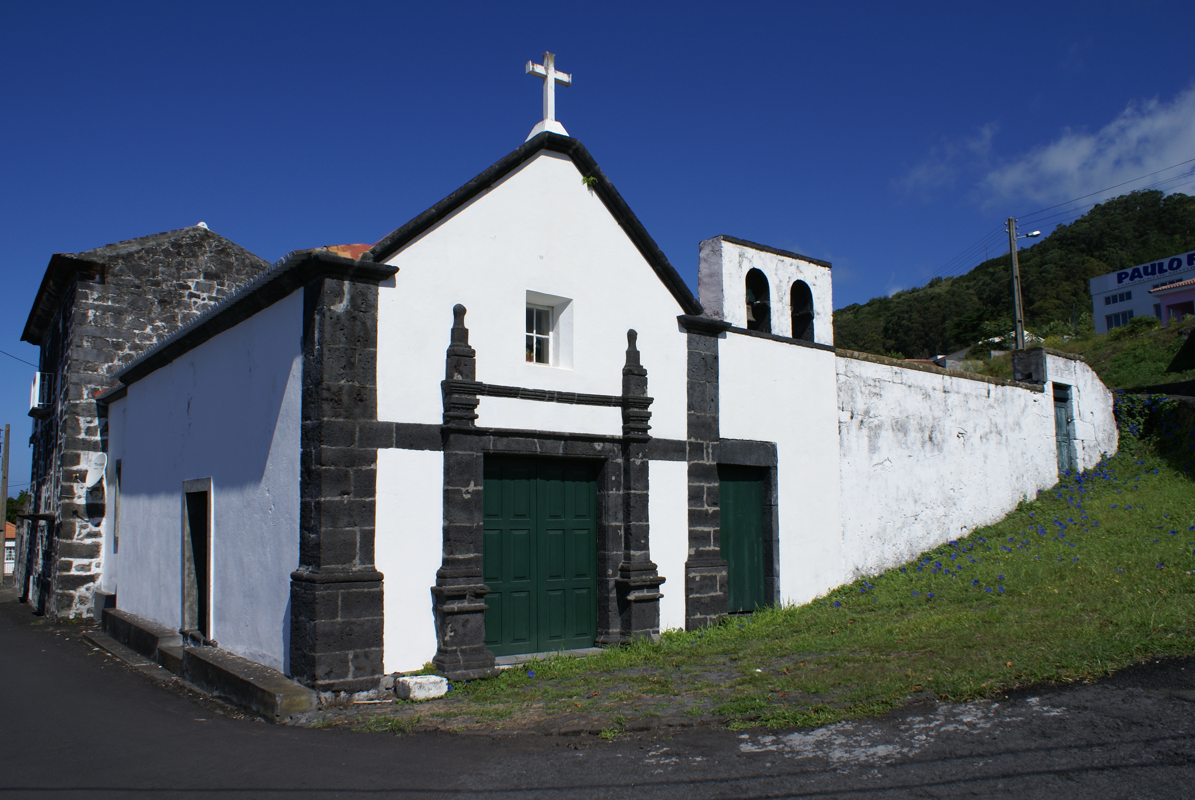 Capela de Nossa Senhora da Luz, Fachada, Santo Amaro, Velas, Ilha de São Jorge, Açores